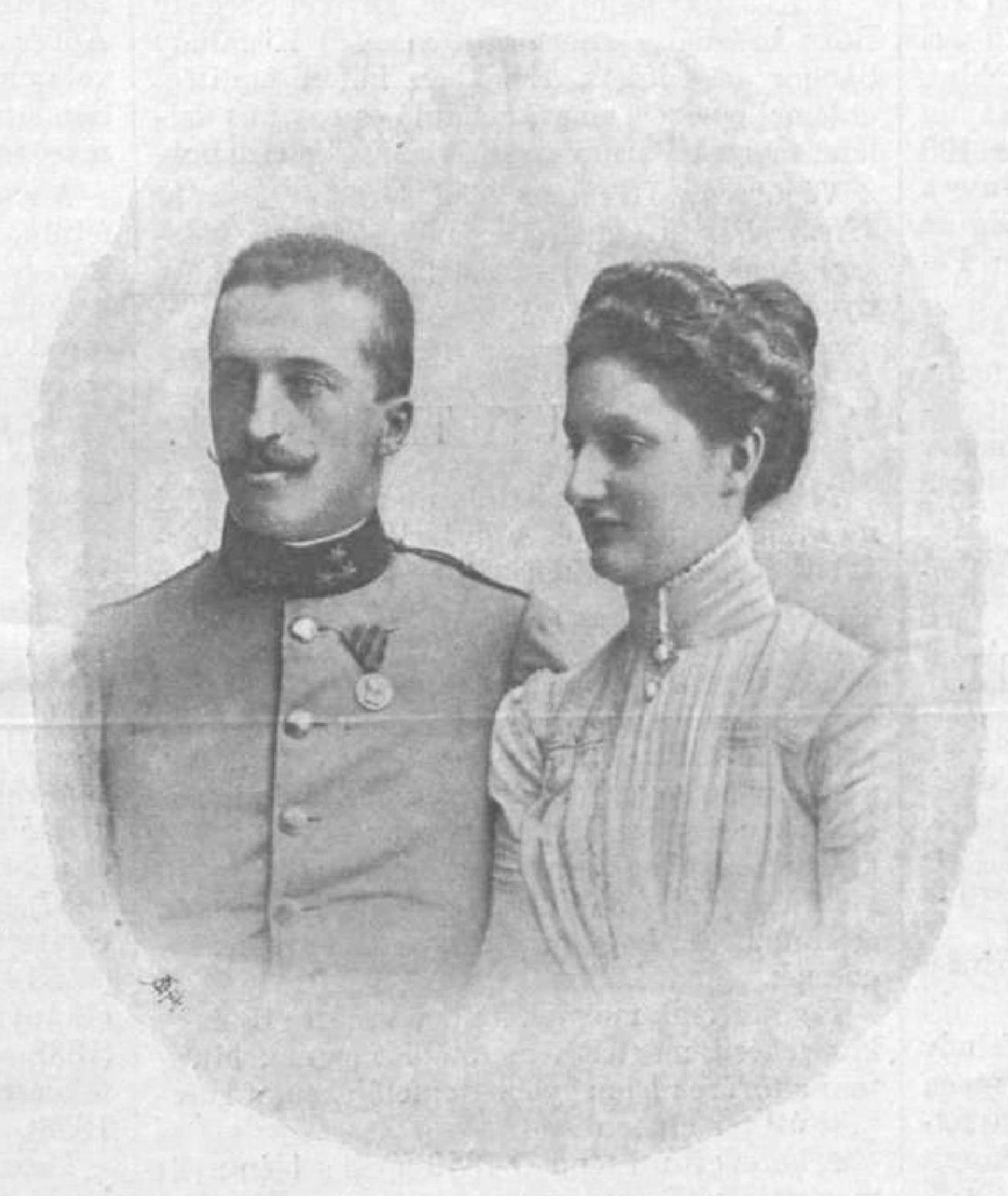 Mária Immakuláta Raineria főhercegnő (1878–1968) és férje Róbert württembergi nagyherceg (1873–1947)